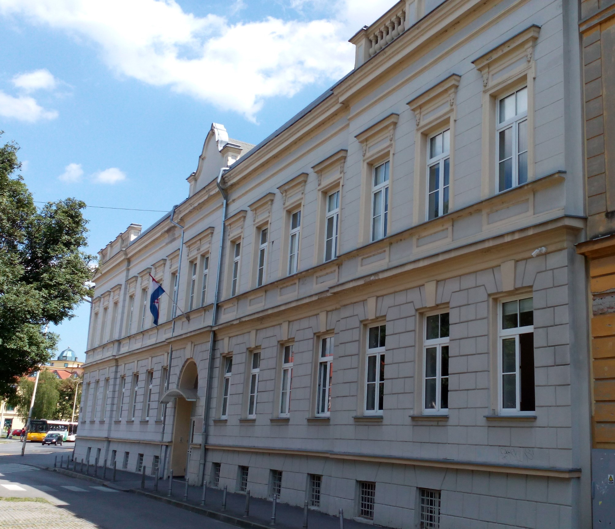 Ekonomski fakultet u Osijeku.